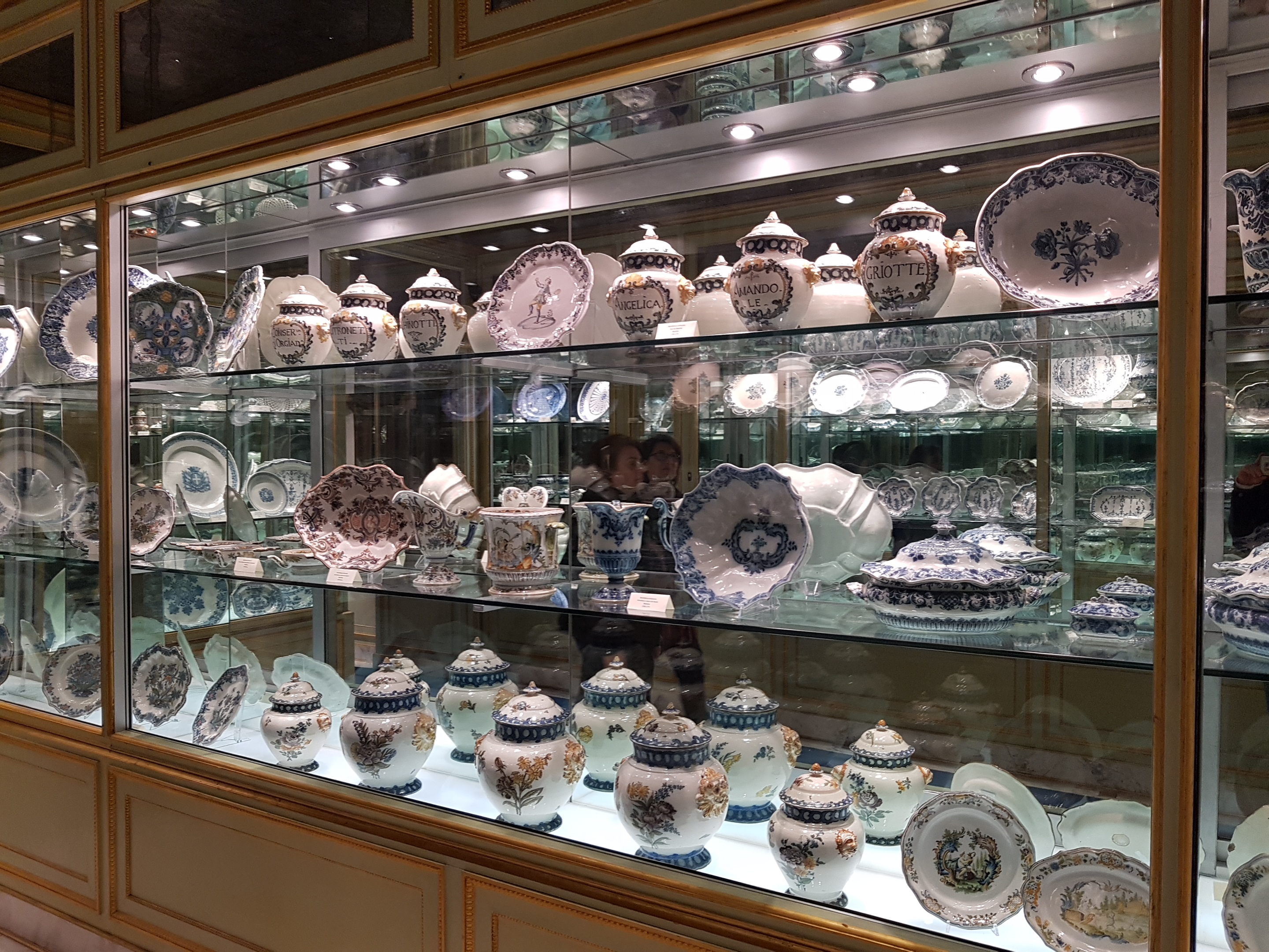 Sala delle Ceramiche, Museo di Arti Decorative Accorsi–Ometto, Torino